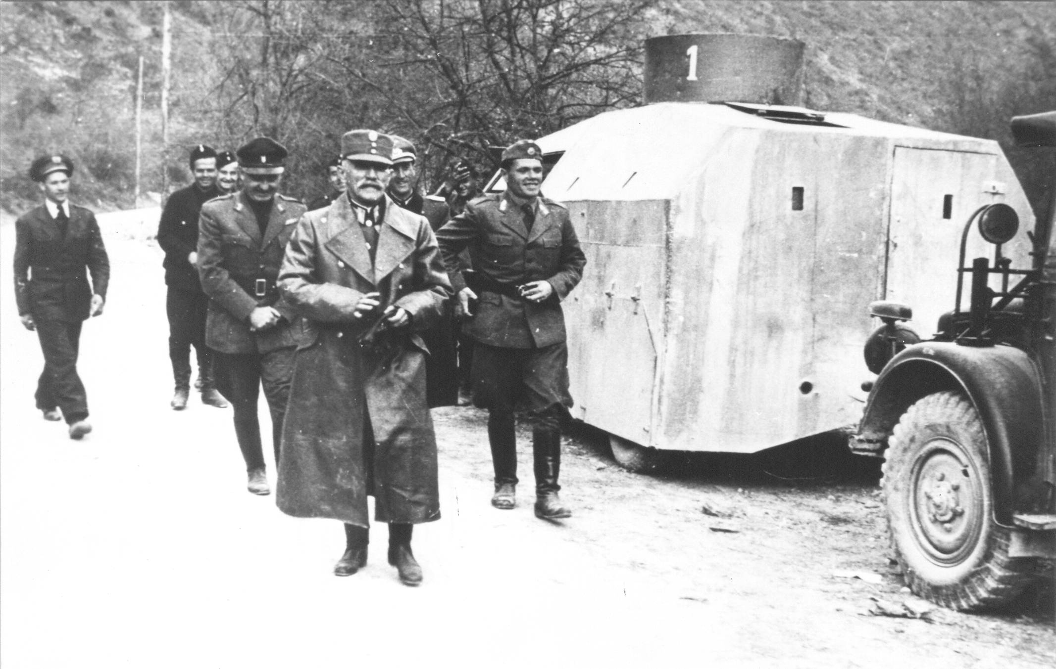 Srpskohrvatski / српскохрватски: General Pekić, Fraković, pukovnik Boban, pored oklopnog automobila Crne legije, reon Prozora, mart 1943.